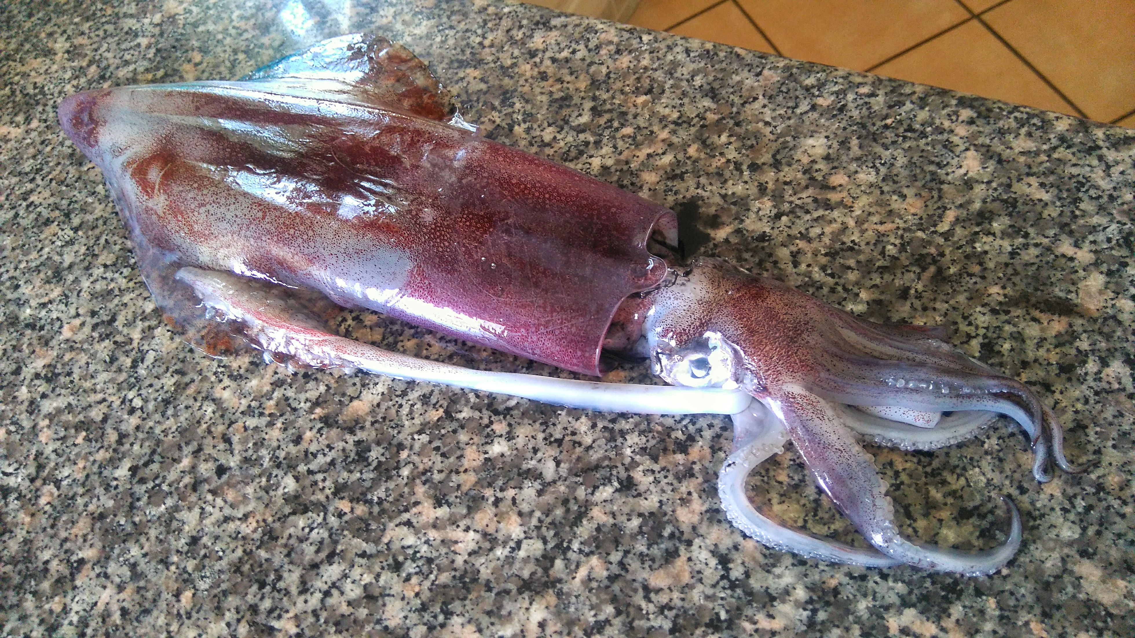 Spécimen de calamr pêché et vendu en Tunisie